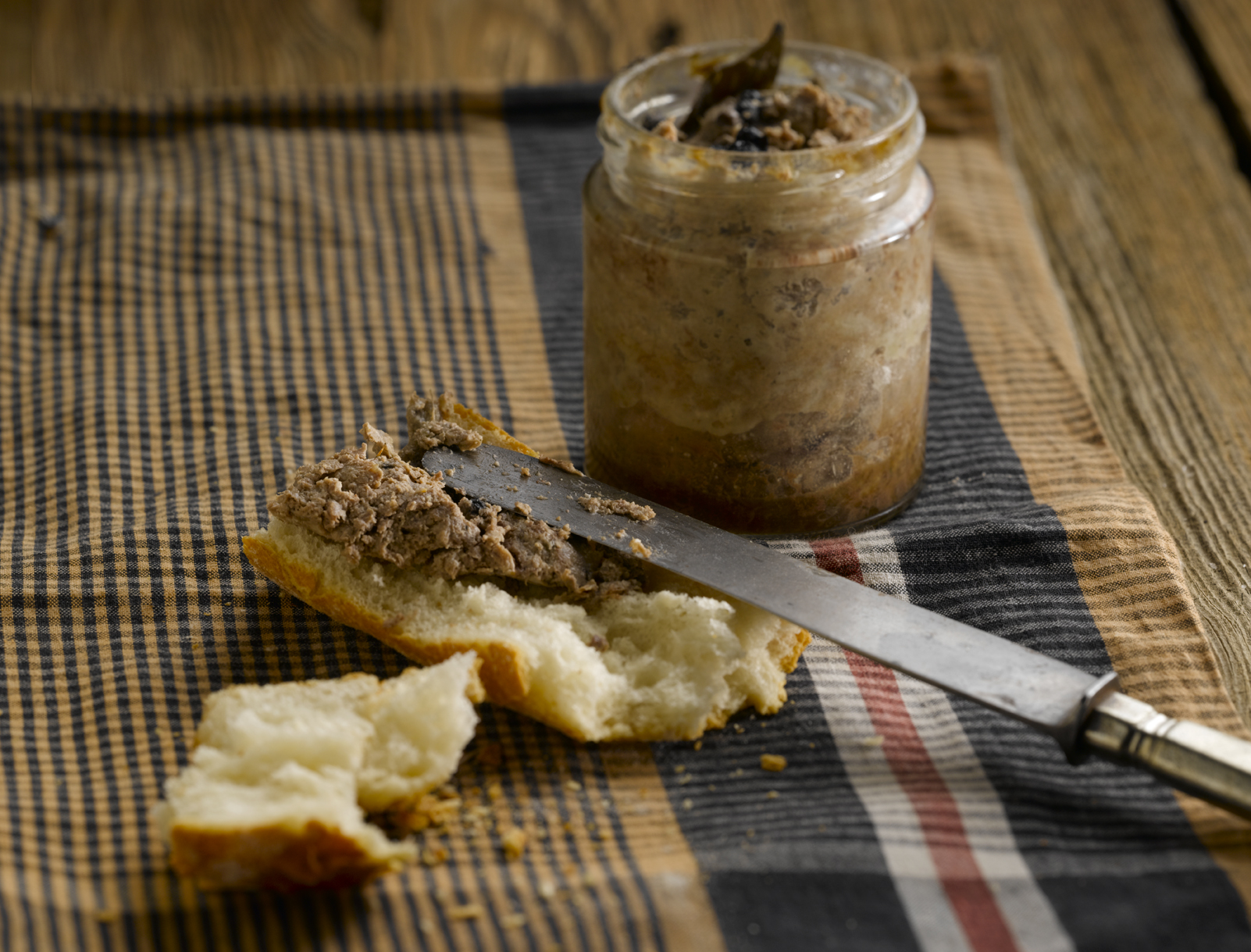 Patés típico del Pirineo Lleida